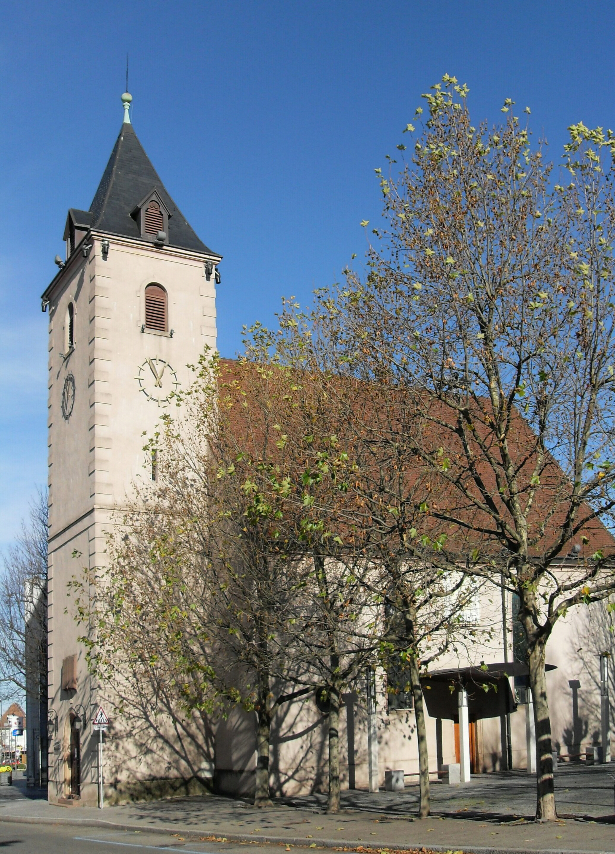 Le temple protestant d'Illzach